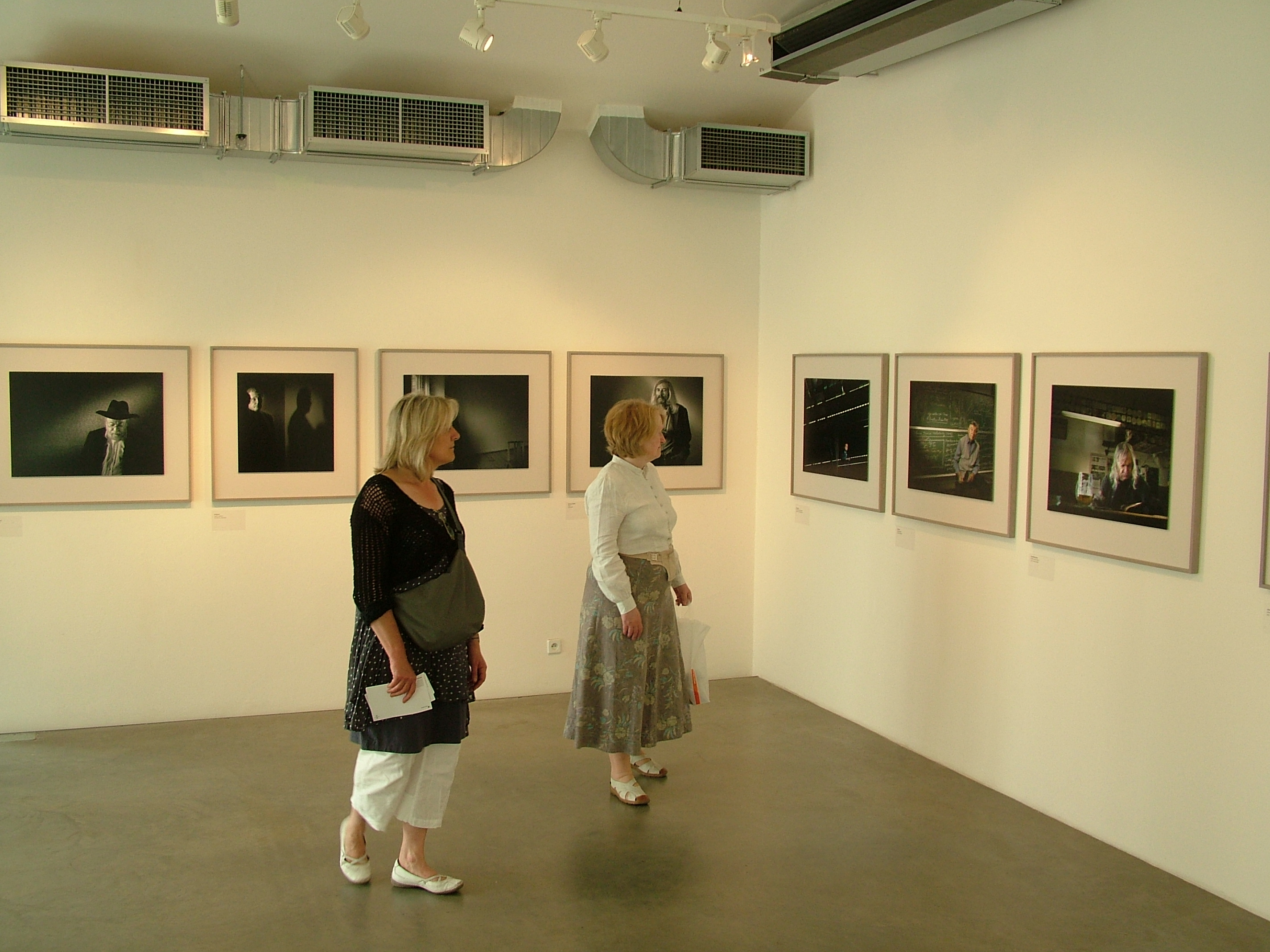 Výstava portrétních fotografií Češi, Kampa Museum, Praha, 2011